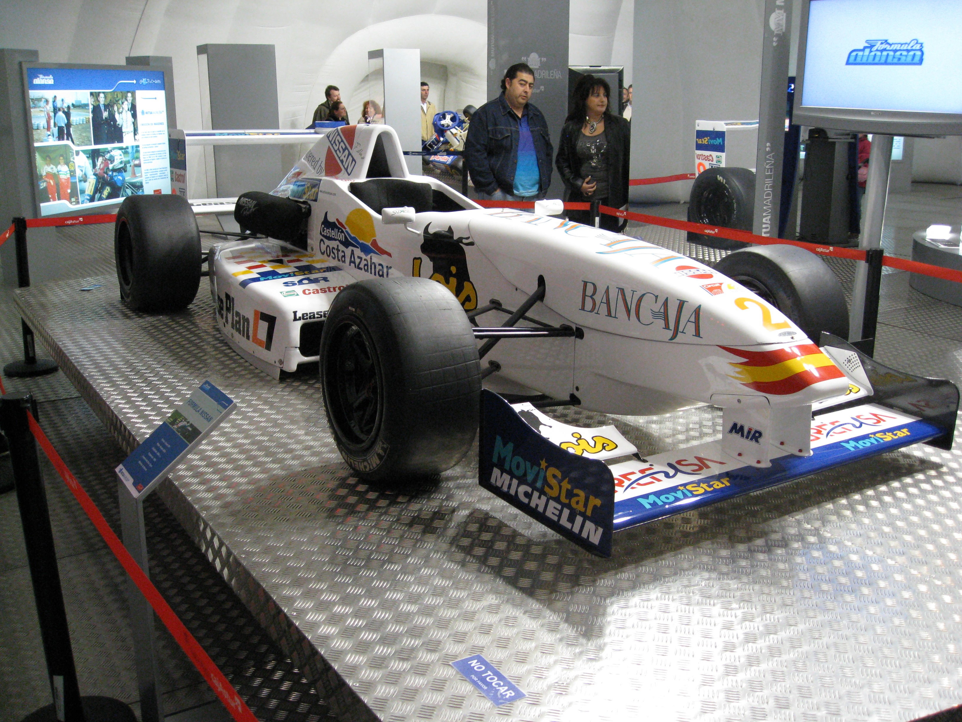 Fórmula Nissan de Fernando Alonso